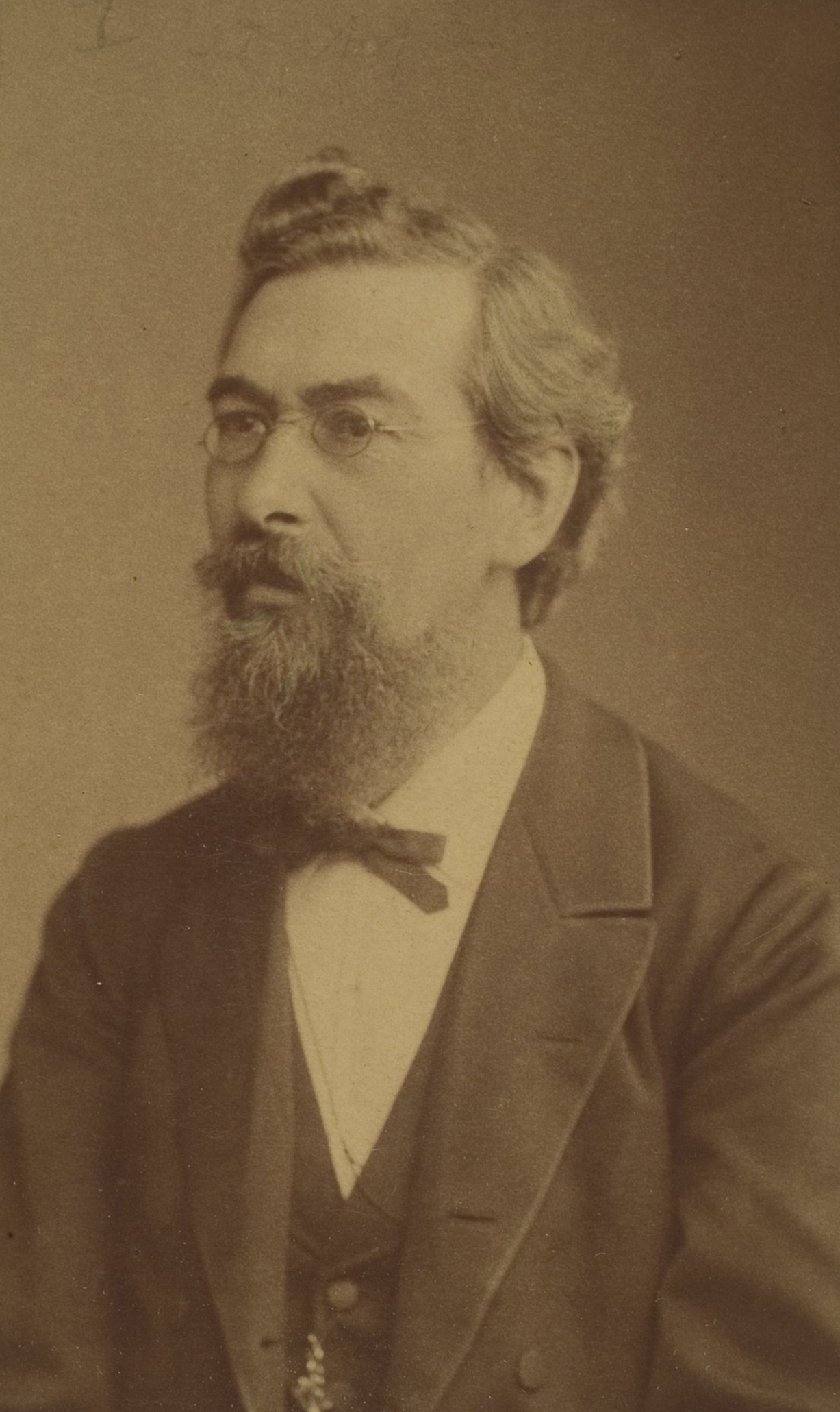 Eduard August Winkelmann, Historiker, 1873–1896 Professor in Heidelberg